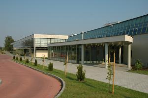 Wydzaił technologi żywności UR w Krakowie